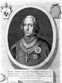 Ritratto del Cardinale Karl Kajetan von Gaisruck (1769-1846), arcivescovo di Milano.